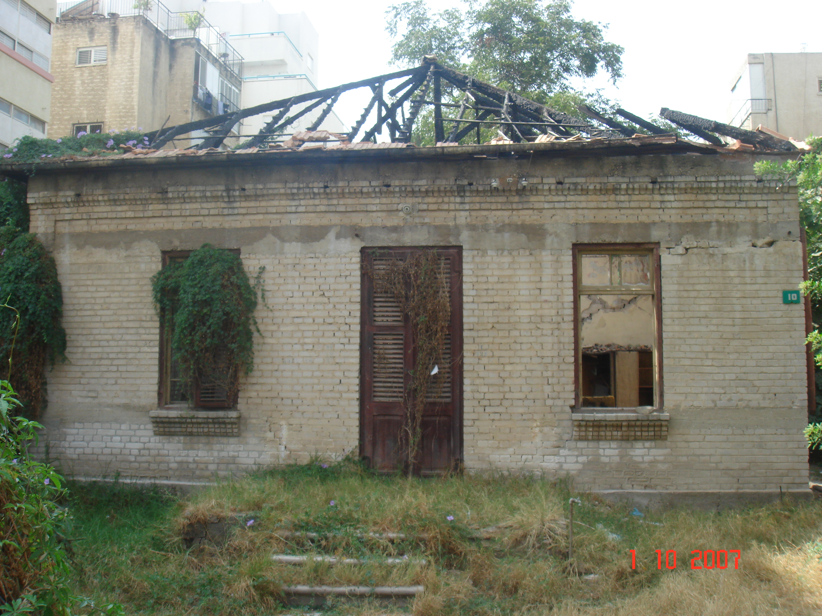 בית משפחת ימיני